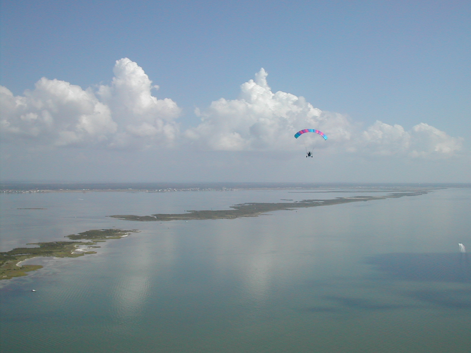 Aransas Bay